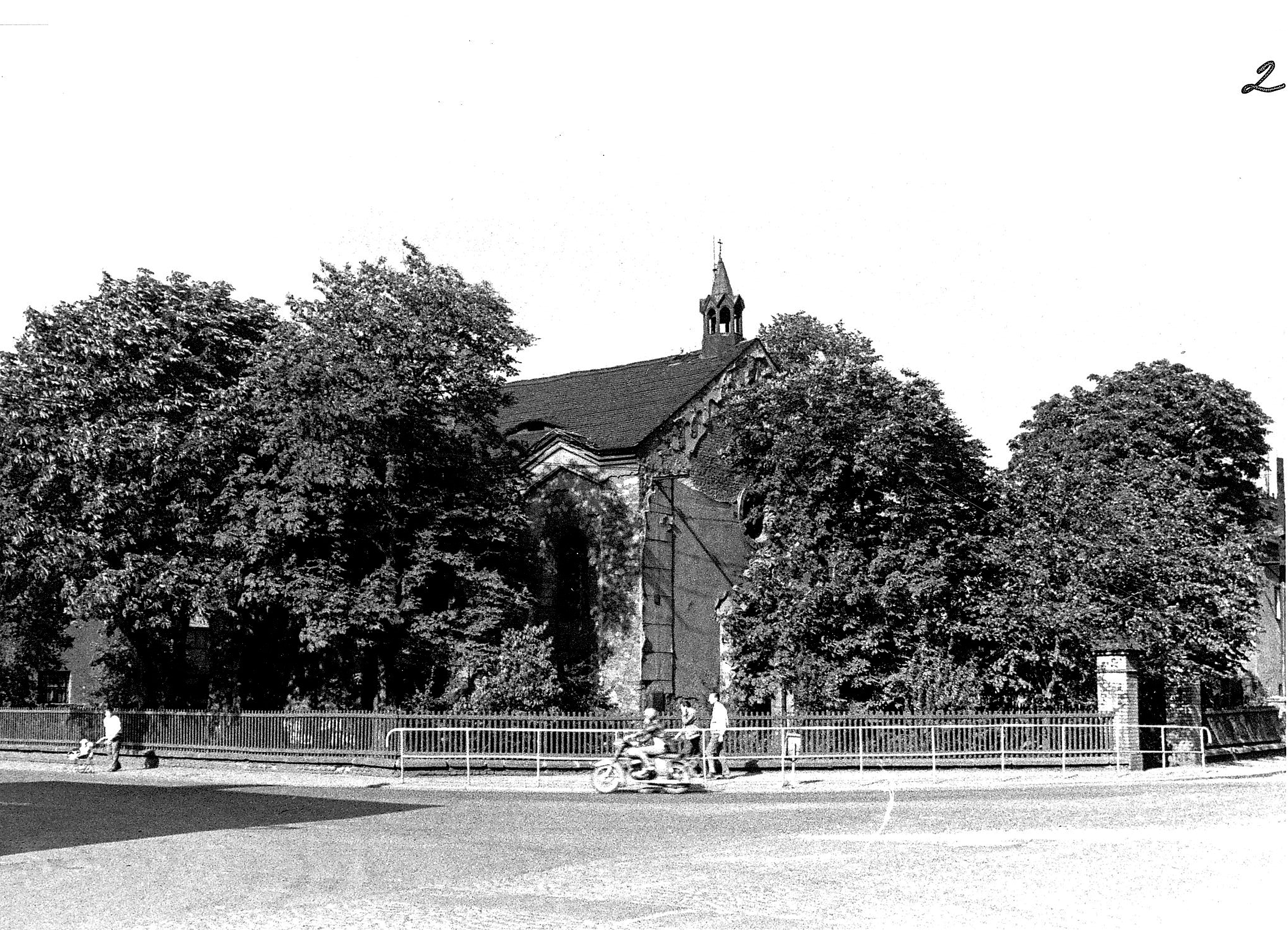 Kostel v zaniklé obci Komořany, okres Most.